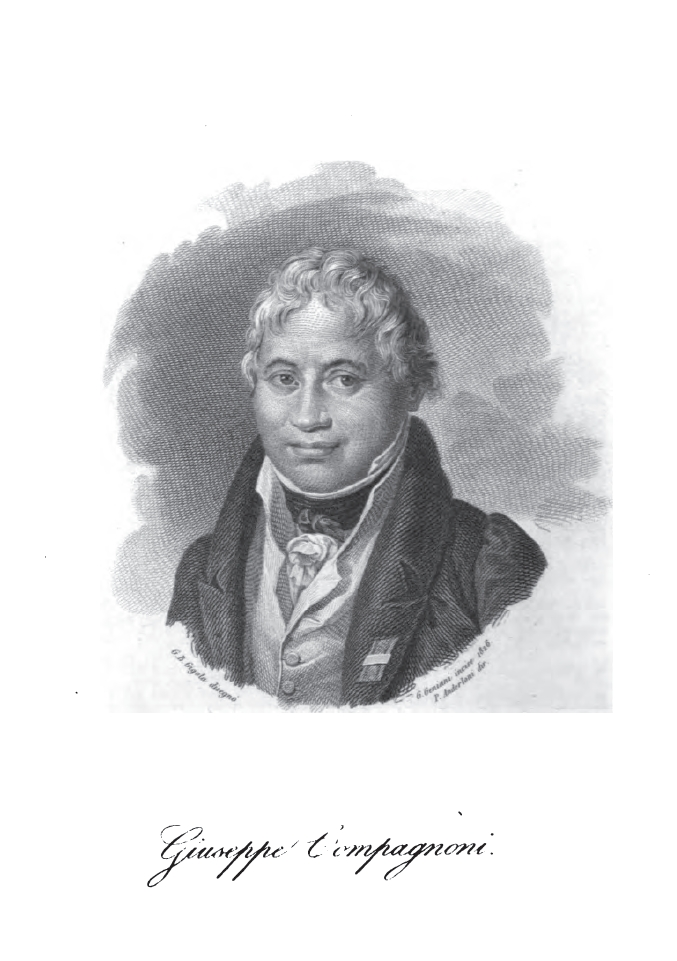 Giuseppe Compagnoni (Lugo, 3 marzo 1754 – Milano, 29 dicembre 1833) è stato un giurista, giornalista e letterato italiano, considerato il "padre del Tricolore"